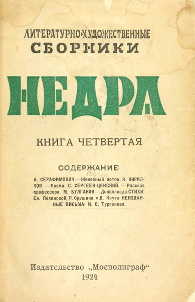 Литературно-художественный сборник Недра за 1924 год